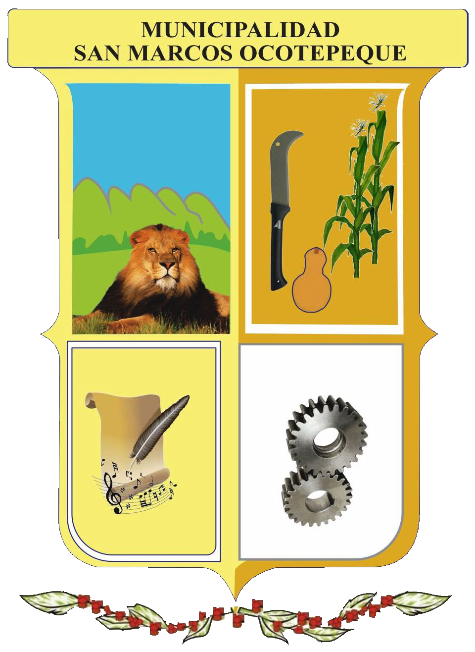 Logo de la Municipalidad de San Marcos, Ocotepeque